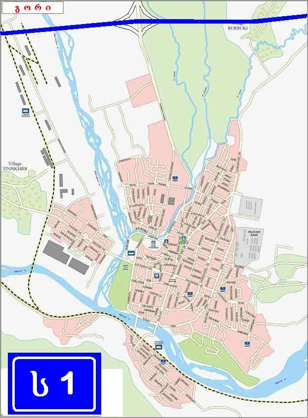 საქართველოს საავტომობილო მაგისტრალი ს1